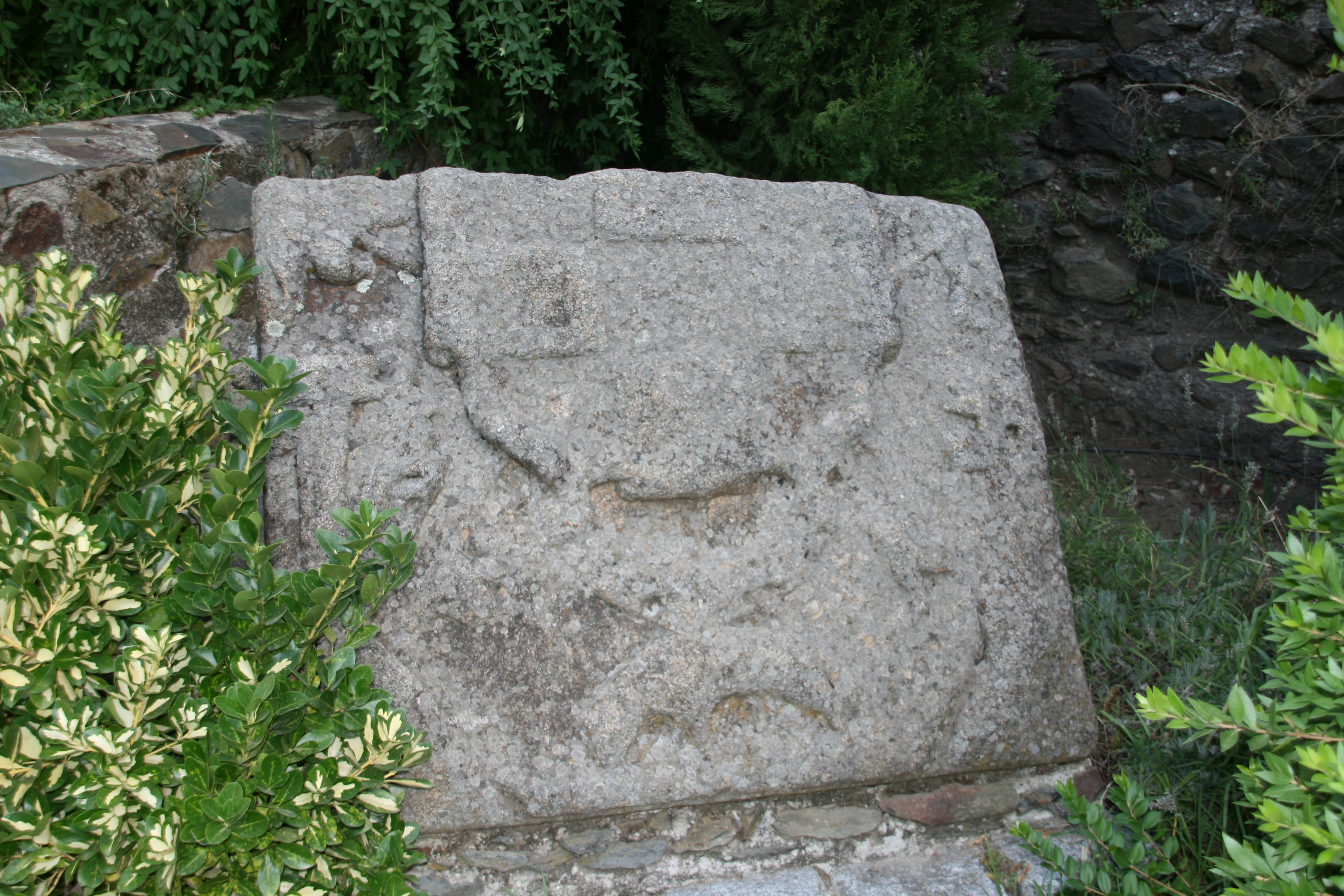 Escudo de la casa de Alba. Se encontraba situado en uno de los puentes cercanos a Granadilla y actualmente inundados. En la actualidad se encuentra depositado junto al castillo